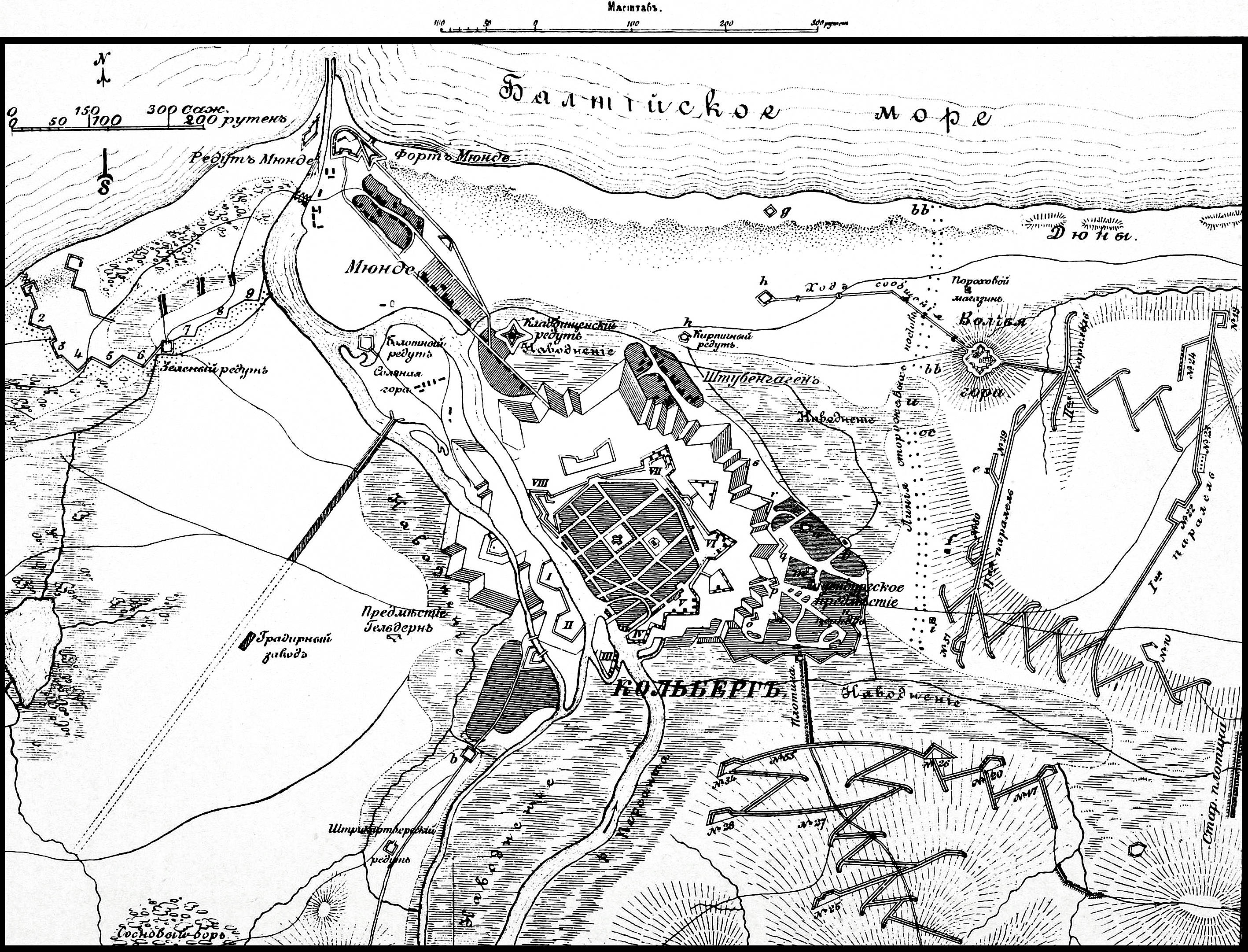 План осады крепости Кольберг в 1807 году. Эта фотография была использована для иллюстрирования статьи «Кольберг» опубликованной в тринадцатом томе «Военной энциклопедии», который был издан книгоиздательским товариществом И. Д. Сытина в 1913 году в столице Российской империи городе Санкт-Петербурге. Более подробное описание к этой картинке можно прочесть в указанной выше статье.